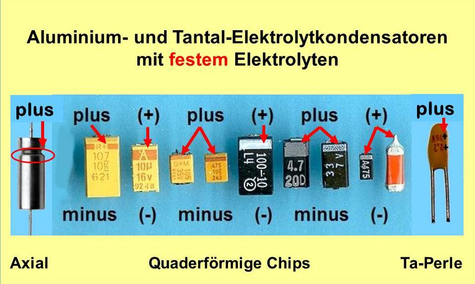 Bei Aluminium-und Tantal-Elektrolytkondensatoren mit festem Elektrolyten wird im Allgemeinen die Anode, der Plus-Anschluss, mit einem Aufdruck (Balken) gekennzeichnet.